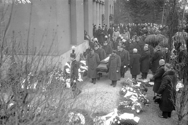 Des Grossindustriellen Hugo Stinnes letzte Fahrt. Der Sarg wird von Bergknappen und Schiffs-Offizieren aus dem Trauerhause getragen. Hinter dem Sarg die Angehörigen des Verstorbenen.